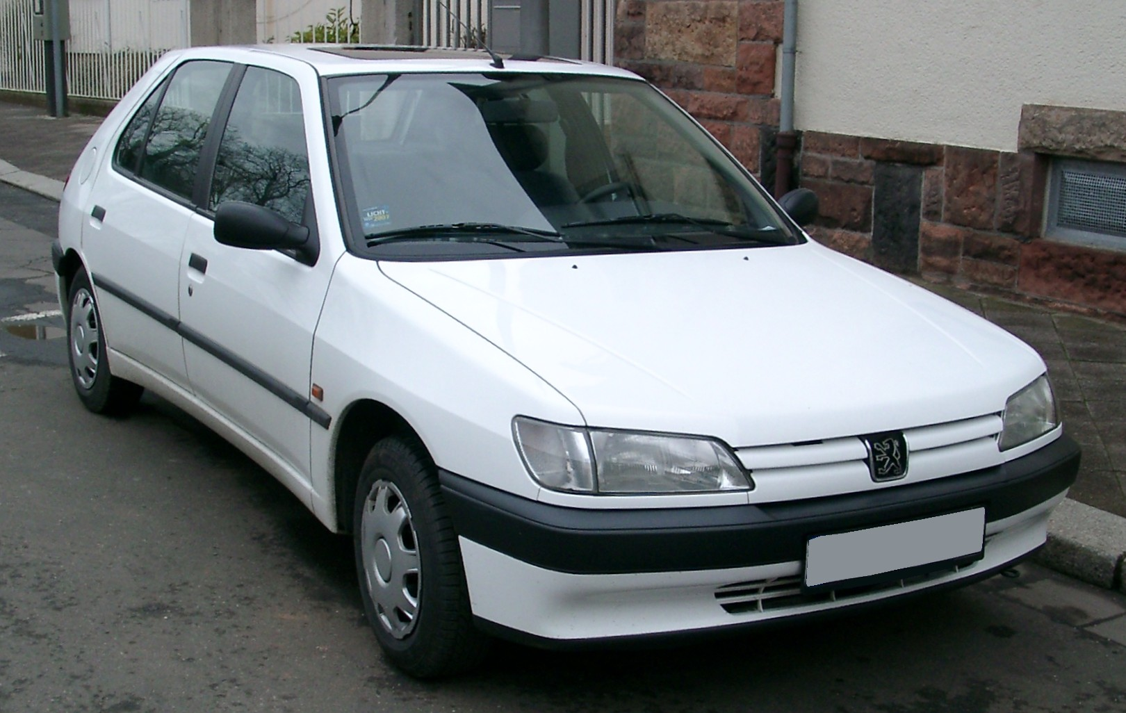 Peugeot 306 XR